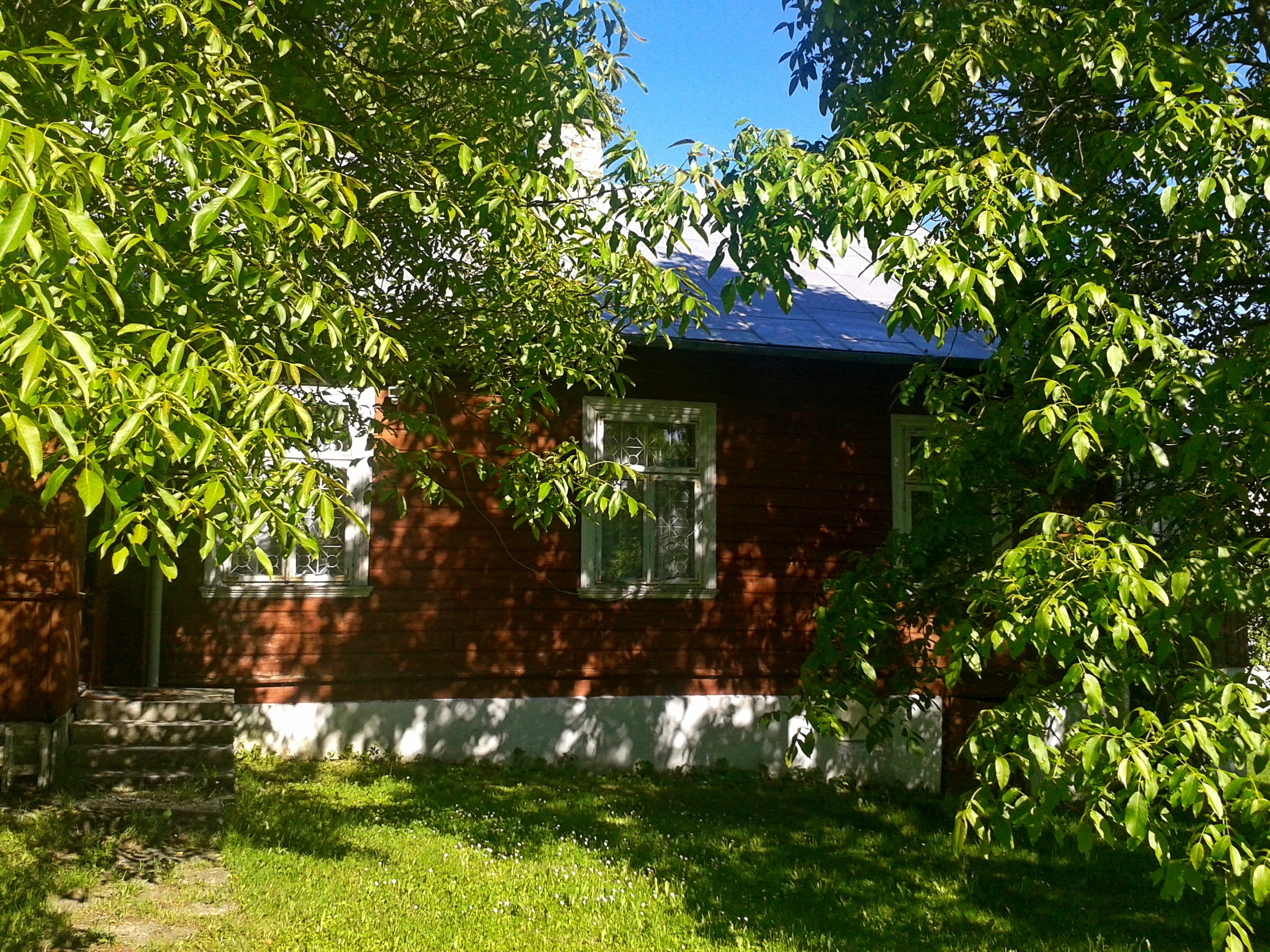 Dawny dom ihumeni, następnie plebania, w Wirowie